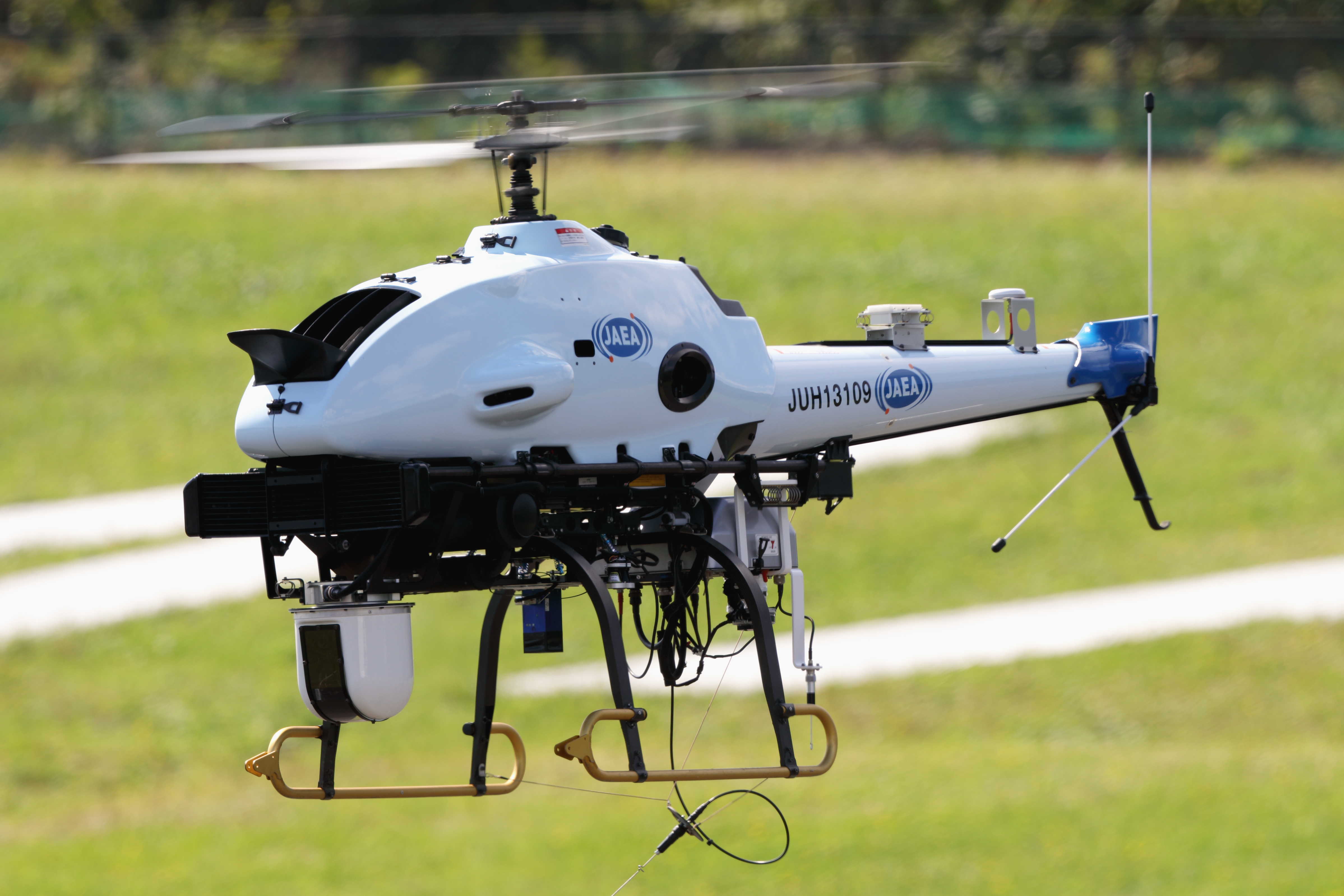 国立研究開発法人日本原子力研究開発機構が開発した、空間線量測定用無人ヘリコプター。 ヤマハ発動機の自律飛行型無人ヘリコプターRMAX G1に、専用の放射線測定システムを搭載し地上からの直達γ線及び空気による散乱線を測定する。